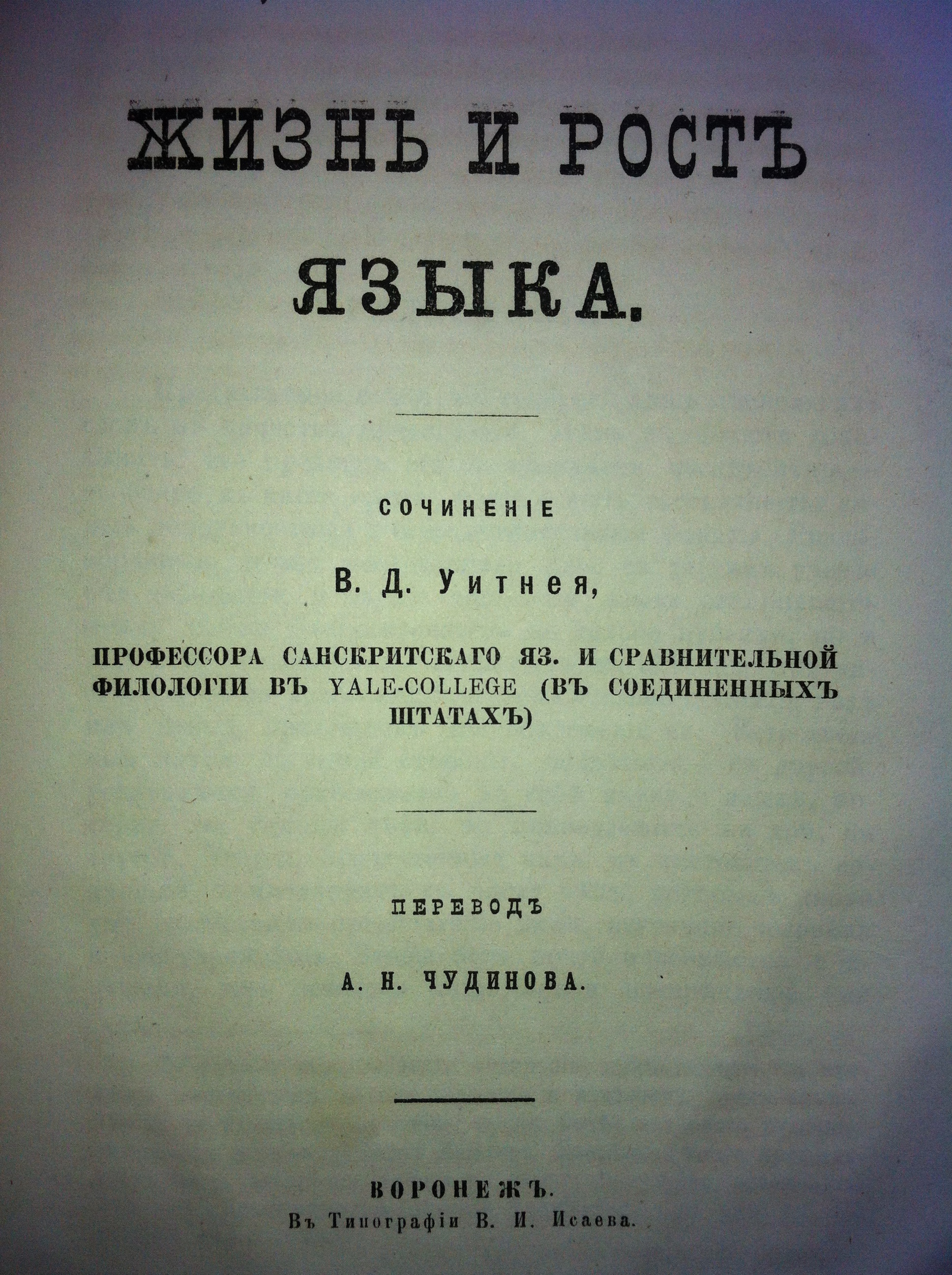 Жизнь и рост языка. Пер. А. Н. Чудинова